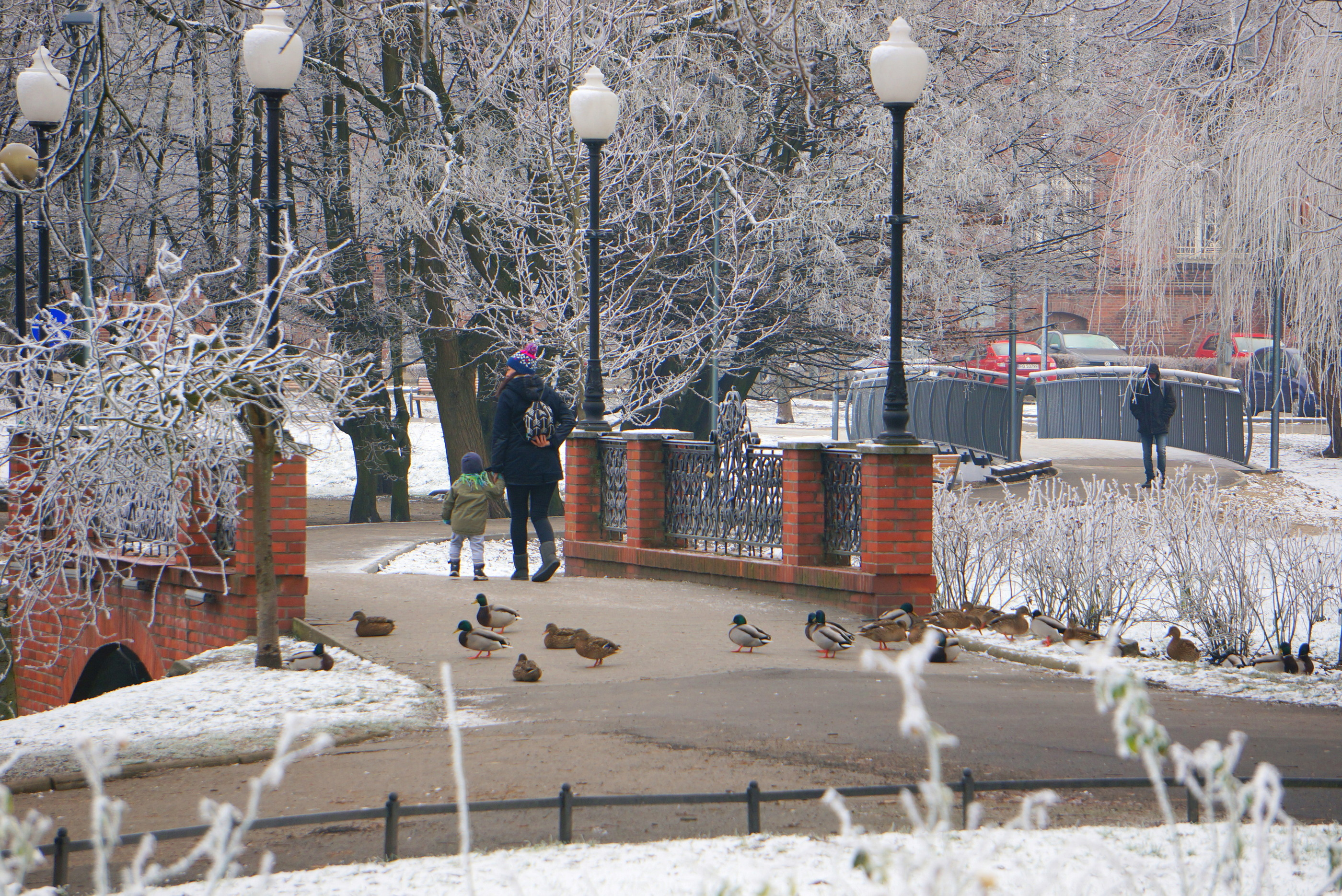 Gorzów Wielkopolski, Park Wiosny Ludów przez gorzowian nazywany "Parkiem Róż". W 2019 r. planowana jest jego modernizacja m.in. w zakresie ścieżek spacerowych, dojść do stawu, placu zabaw, oświetlenia i toalet. Na fotografii, mostki nad Kłodawką.